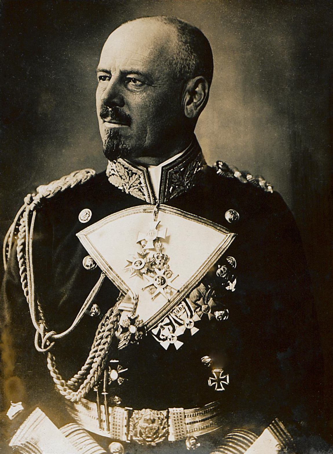 Vizeadmiral Hipper, der Befehlshaber der deutschen Aufklärungsschiffe in der Seeschlacht